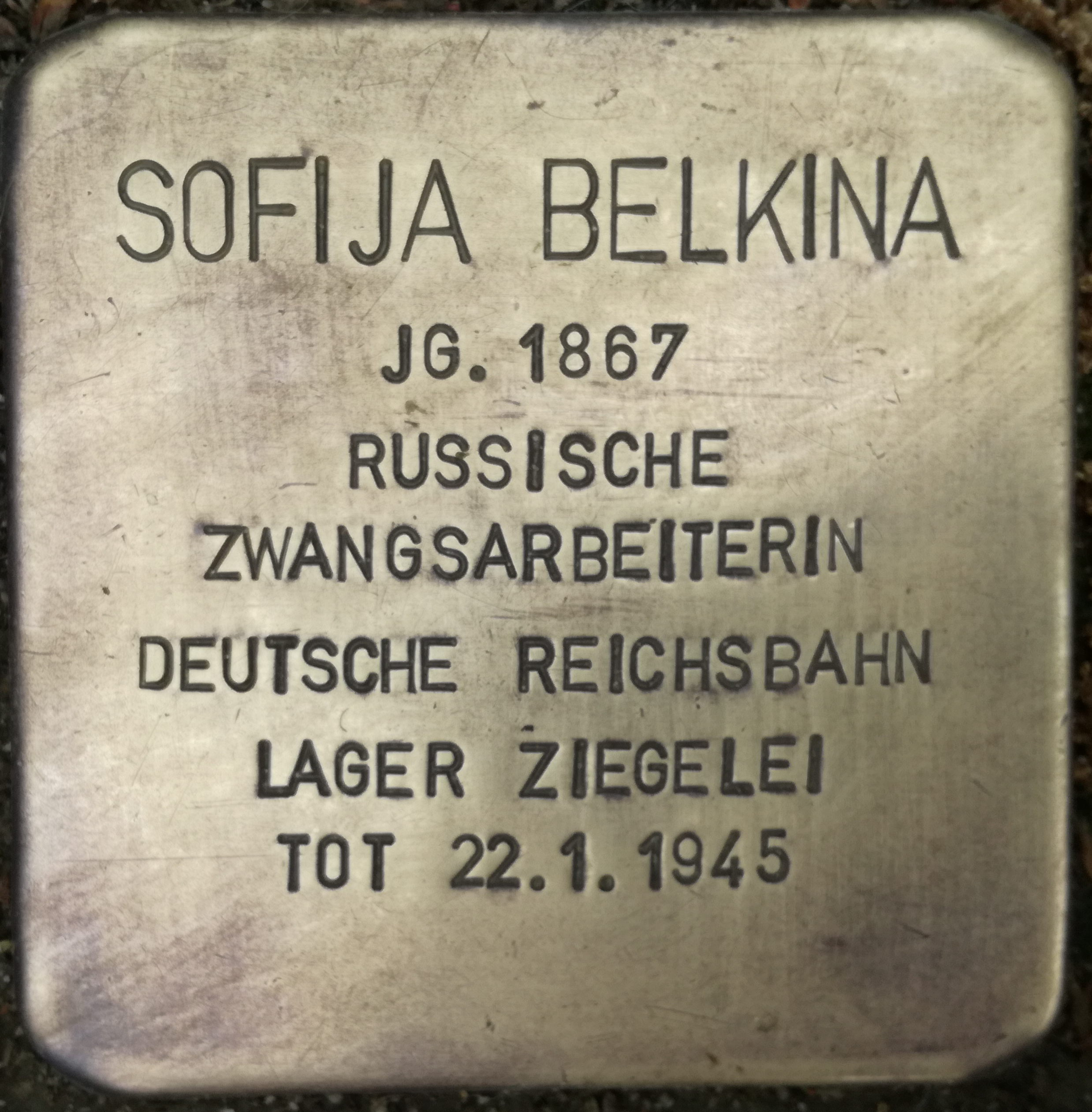 Sofija Belkina Jahrgang 1867 Russische Zwangsarbeiterin Deutsche Reichsbahn Lager Ziegelei tot 22.1.1945